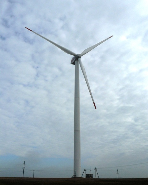 Фото путешествия по Беларуси.